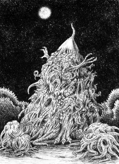 Vision d'artiste de Nyarlathotep en noir et blanc.